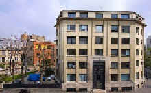 Bâtiment de l'Inetop, 41 rue Gay-Lussac, Paris 5ème